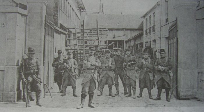 Le 19 janvier 1911, le vignoble de la vallée de la Marne est en état de siège. La troupe interdit les accès d'Épernay et monte la garde chez des négociants, probablement les hommes du 132e régiemnt d'infanterie.